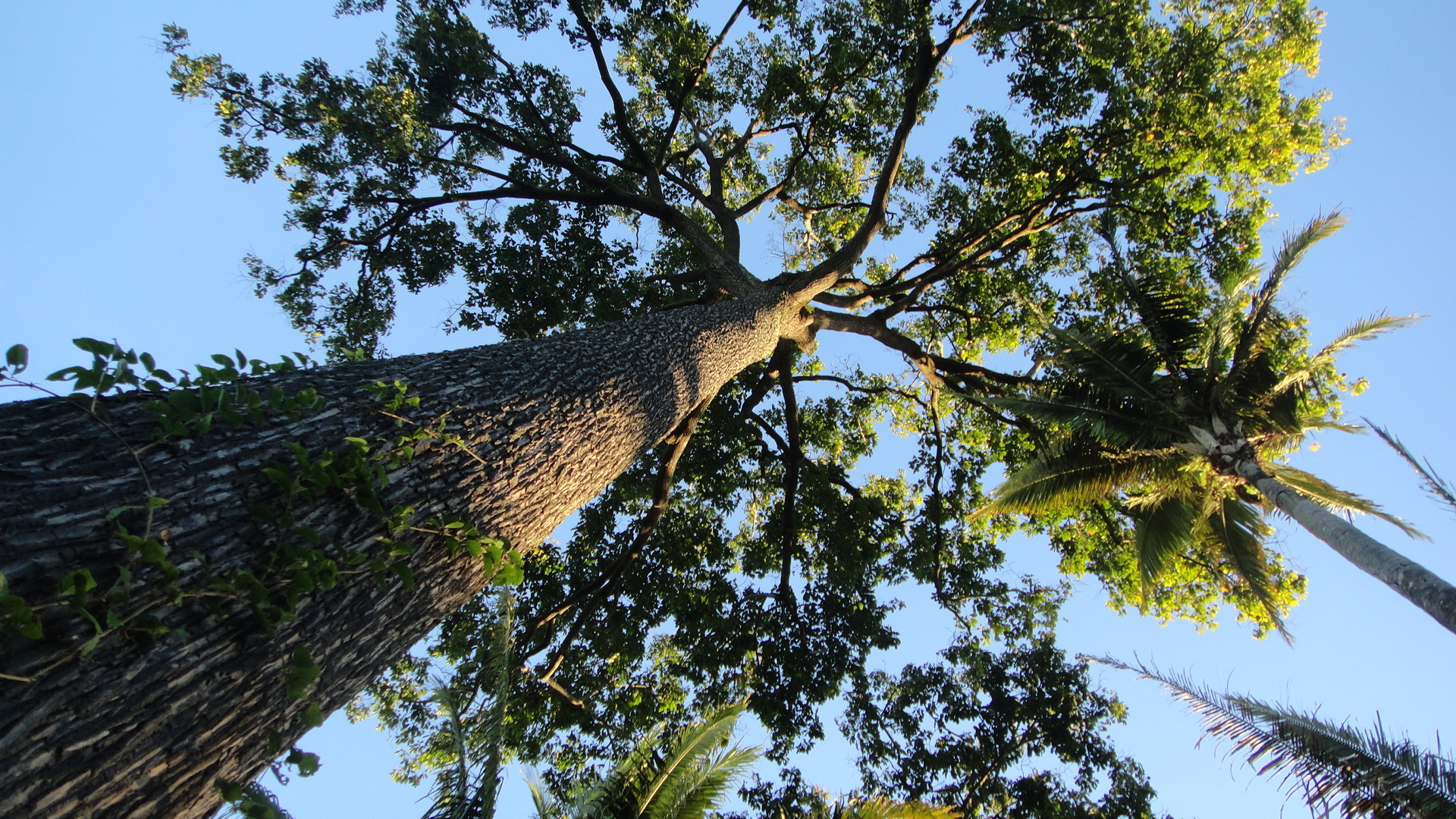 Castanheira-do-Pará, arvore maestra da amazonia.